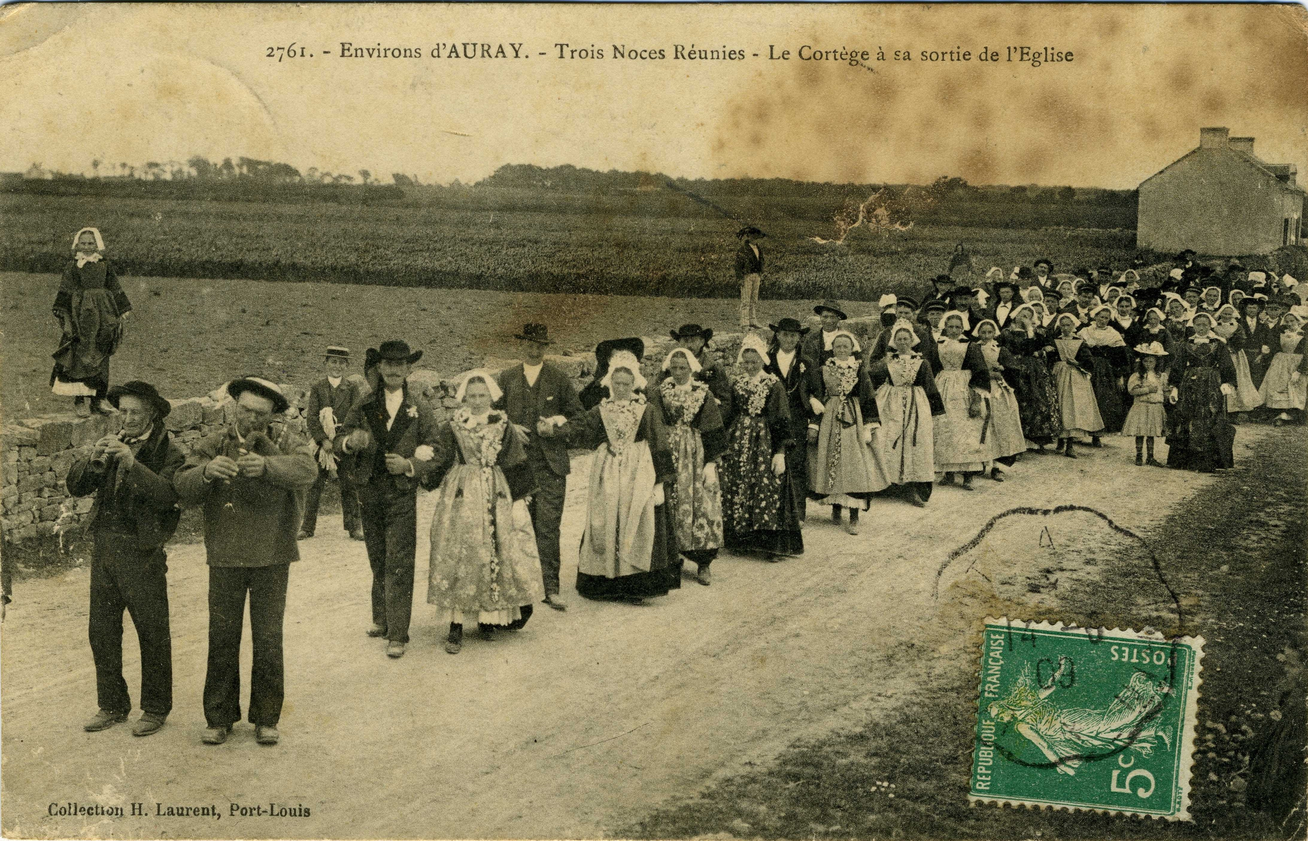 Le cortège de trois noces réunies à la sortie de l'église, accompagné d'un couple de sonneurs de bombarde-biniou kozh. Environs d'Auray dans le département du Morbihan, France. 1908.